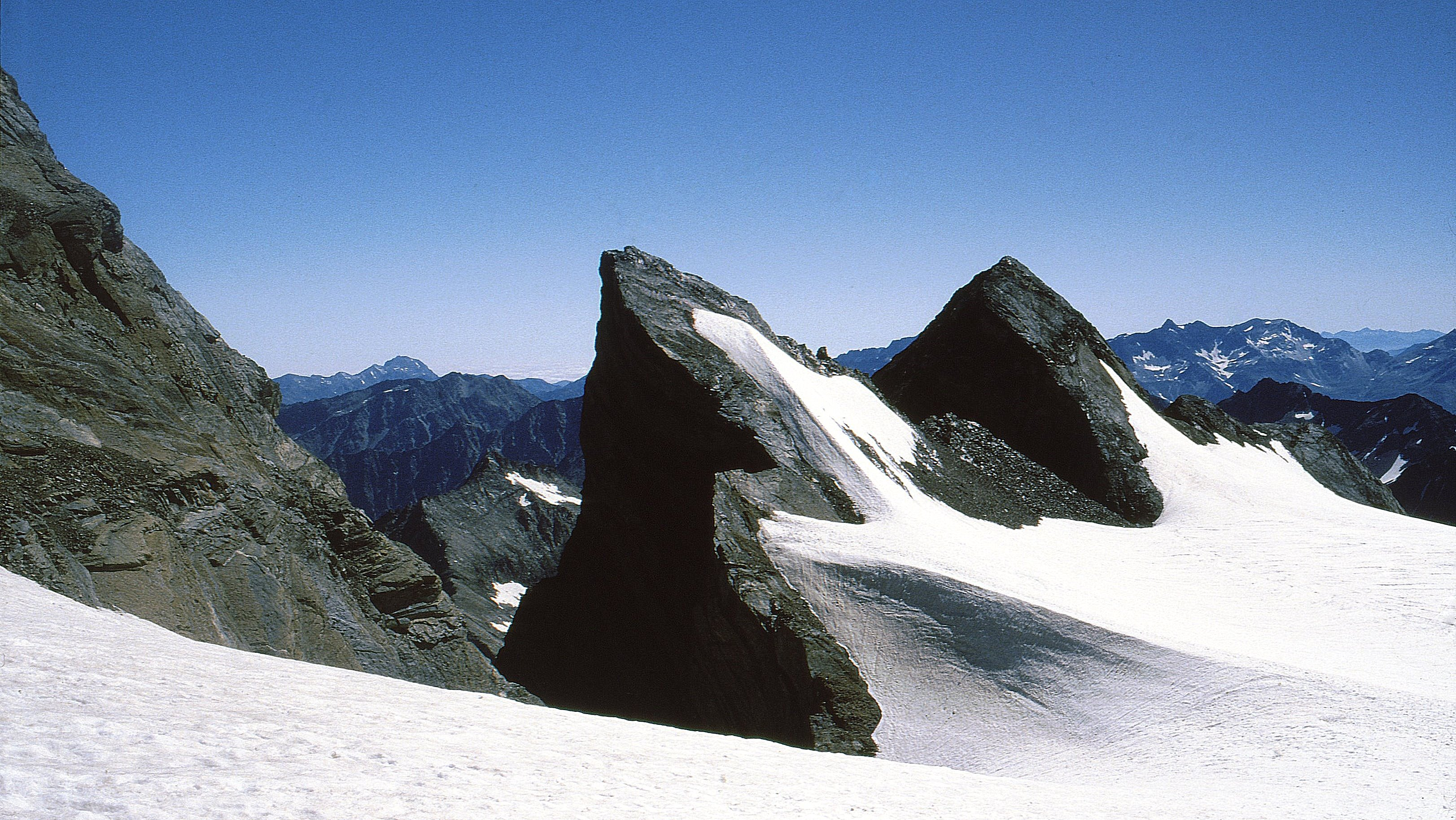 Sommet du Piton Carré depuis le glacier du Vignemale.